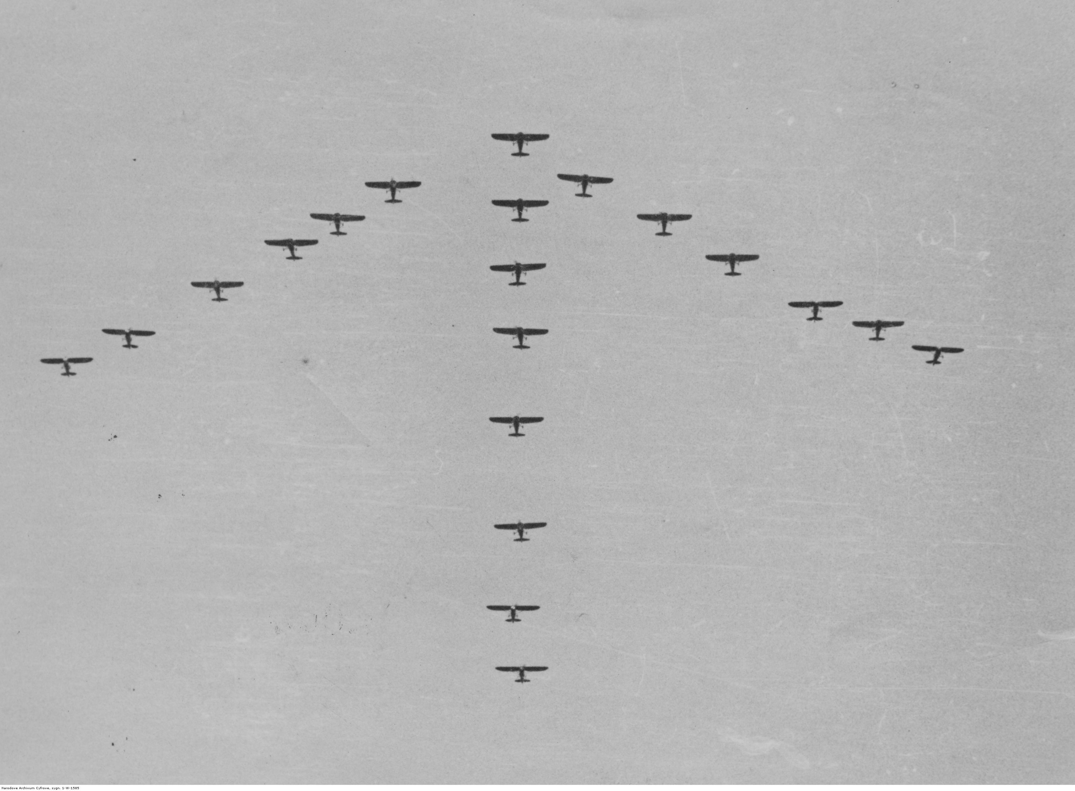 Pokazy lotnicze 4 pułku lotniczego w Toruniu - eskadra samolotów podczas pokazów akrobatycznych. Koncern Ilustrowany Kurier Codzienny - Archiwum Ilustracji. Sygnatura: 1-W-1585